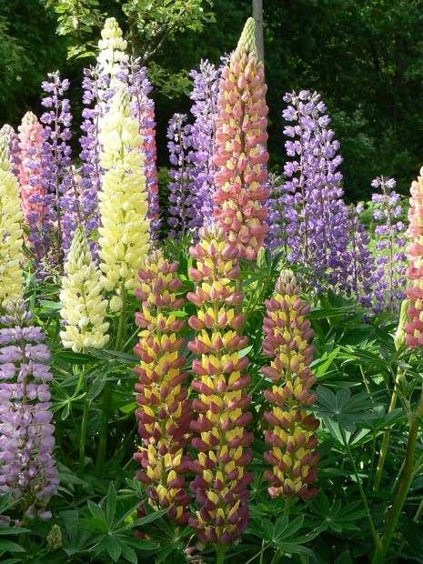 Lupinen in verschiedenen Farbvarianten